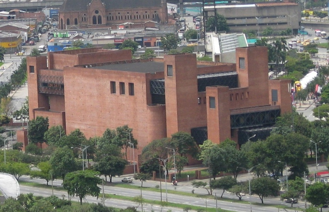 Teatro Metropolitano de Medellín, Colombia